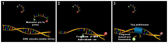 Proves del TaqMan